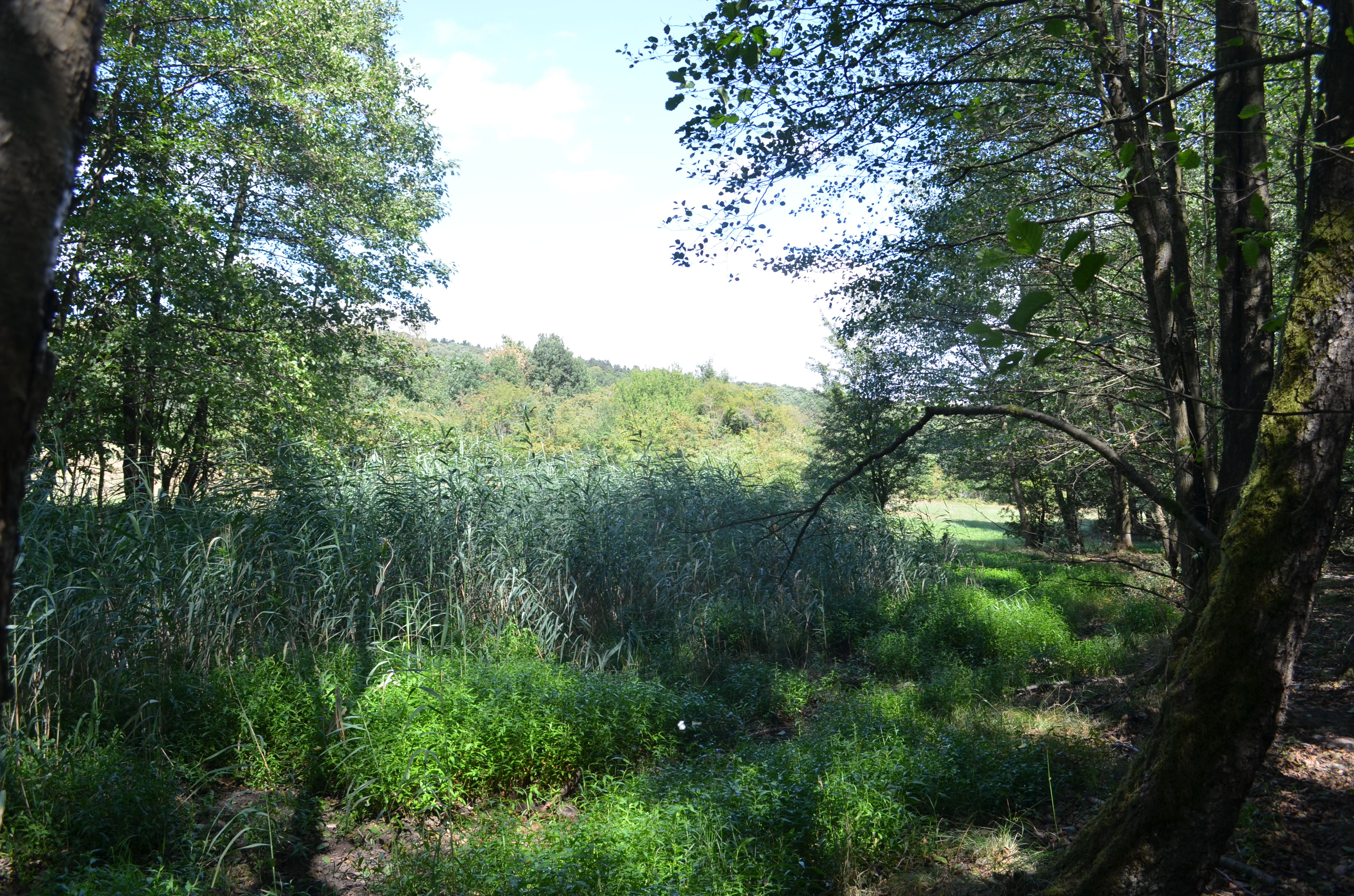 Kronberg, NSG Hinterste Neuwiese bei Kronberg